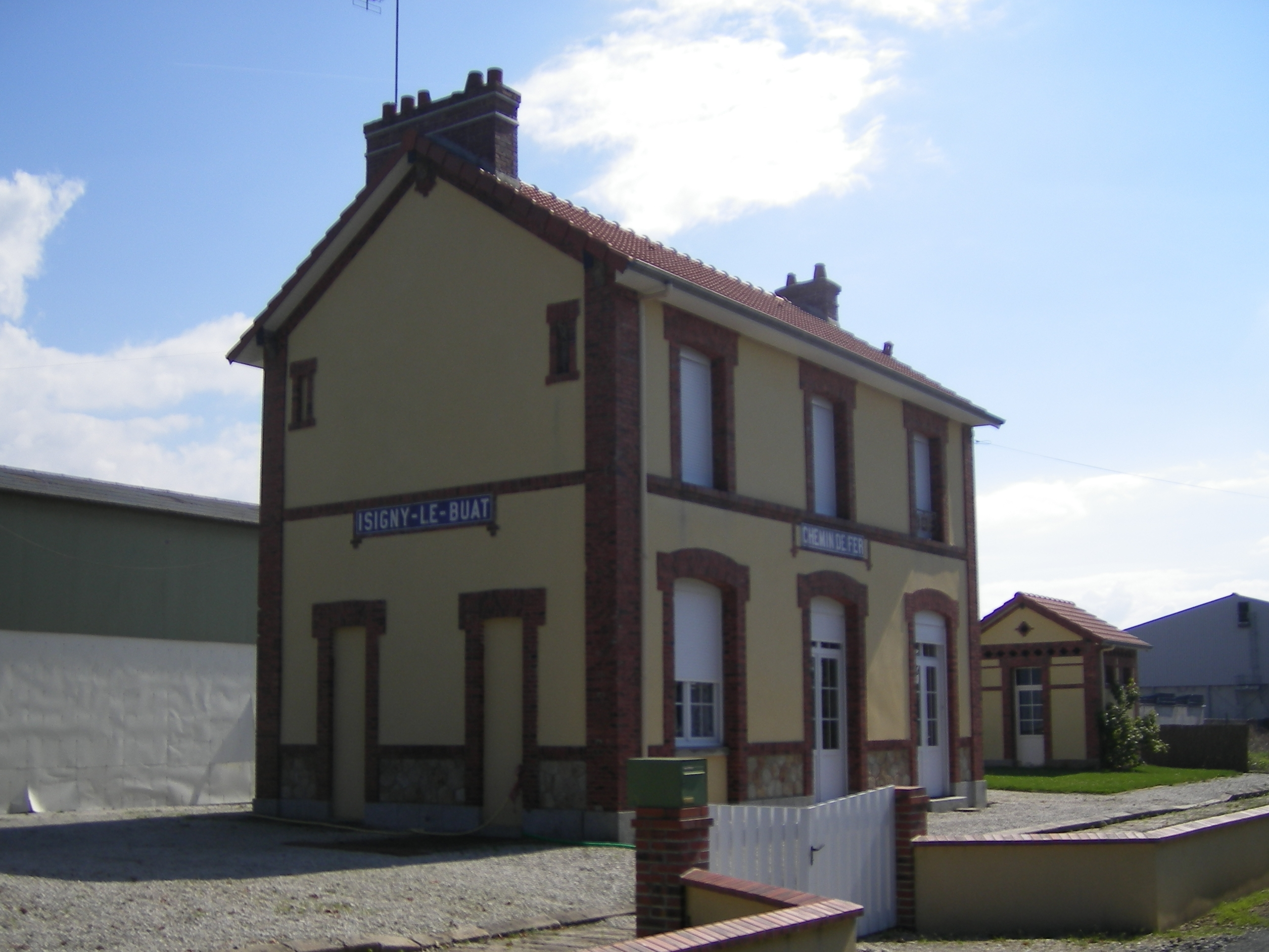 Gare d'Isigny - Le-Buat en août 2007